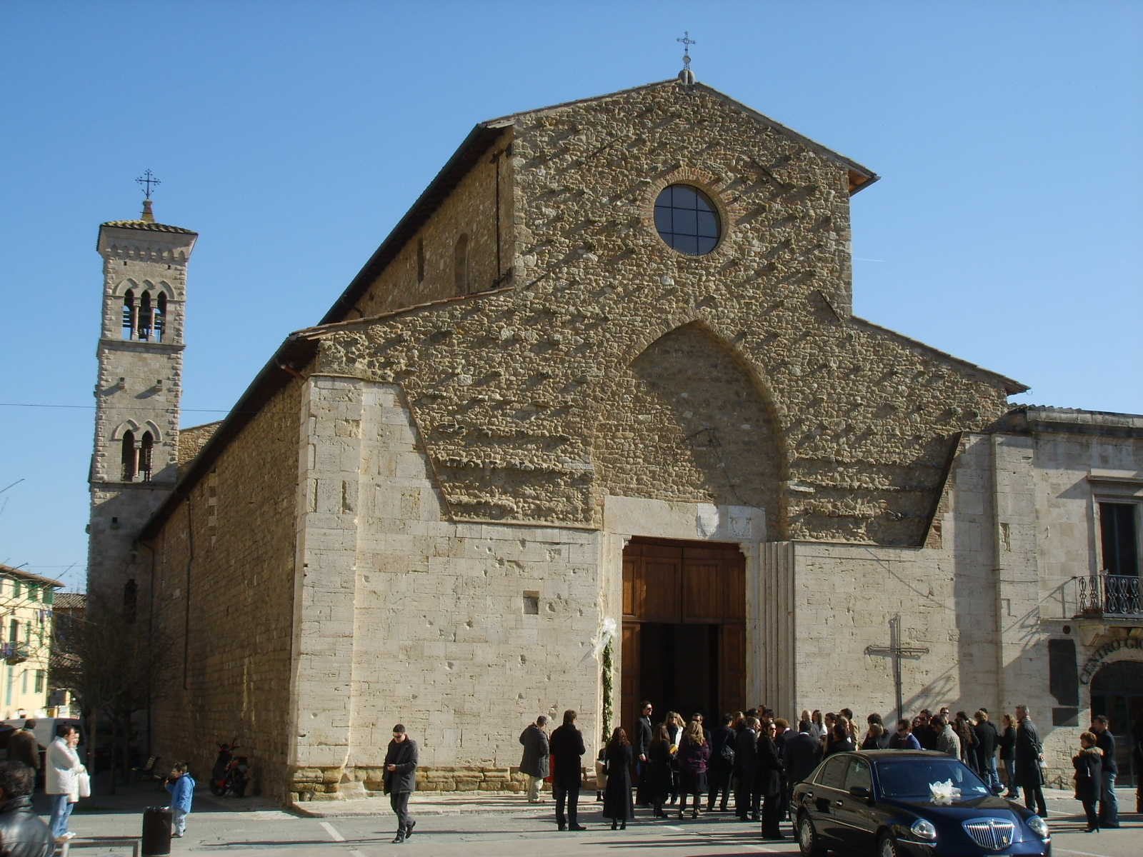 Colle valdelsa, chiesa di sant'agostino